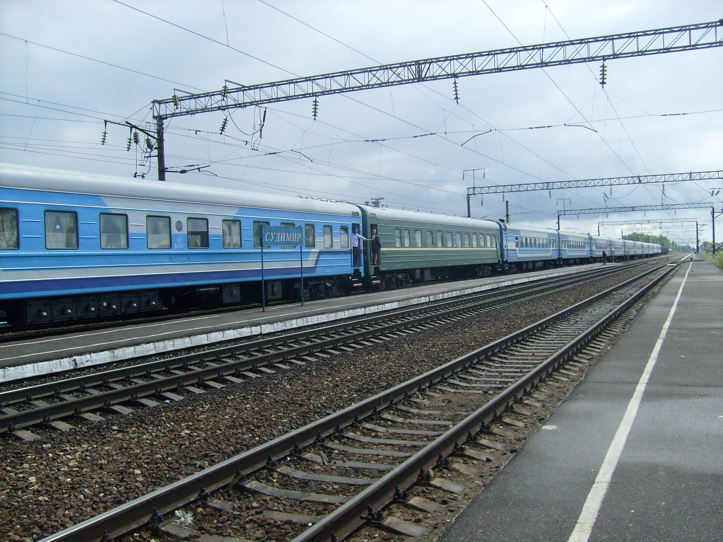 Поезд №139/140 "Пересвет"